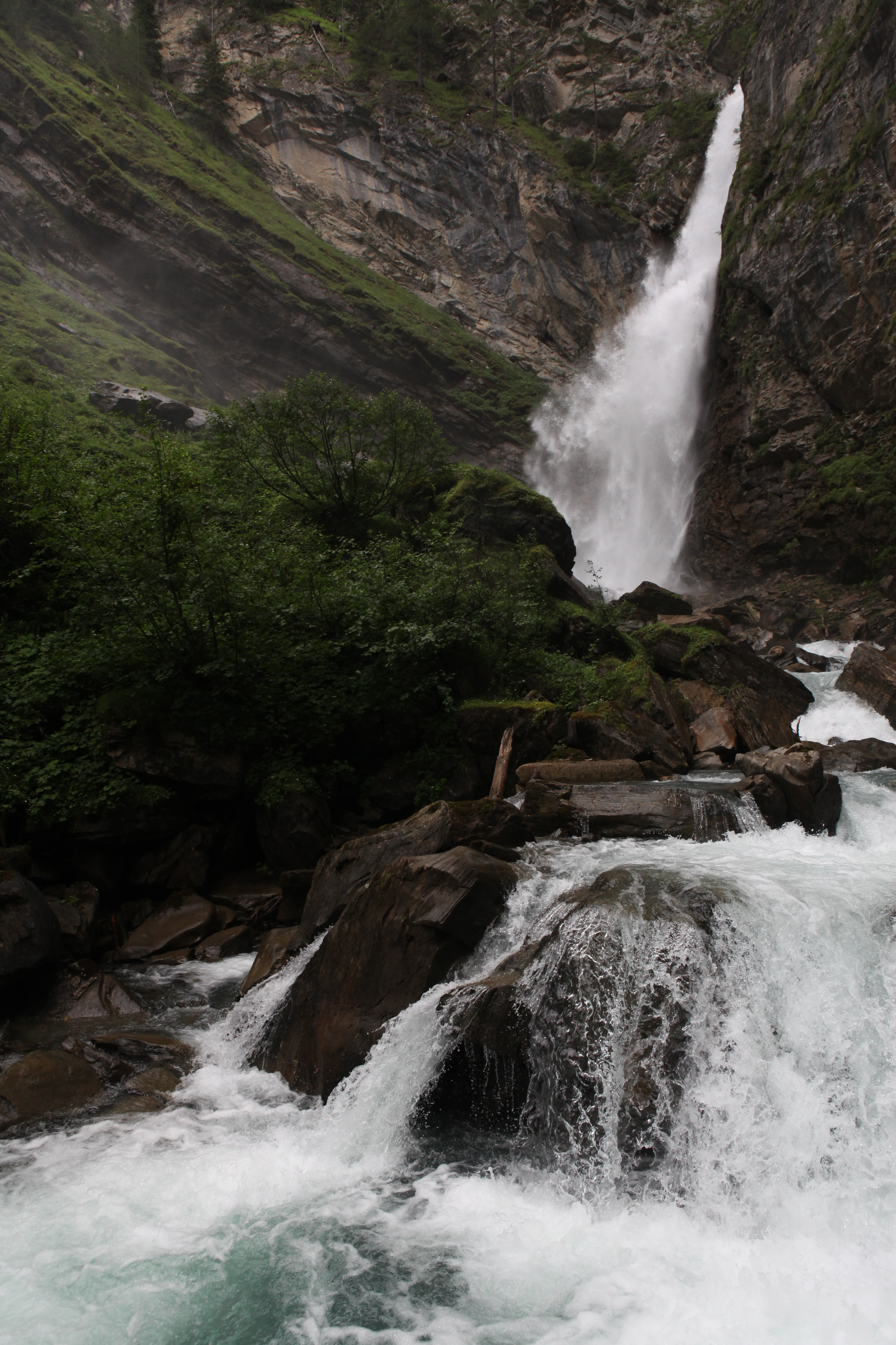 Wasserfall Gößnitzfall bei Heiligenblut am Großglockner This media shows the natural monument in Carinthia with the ID Sp 26.